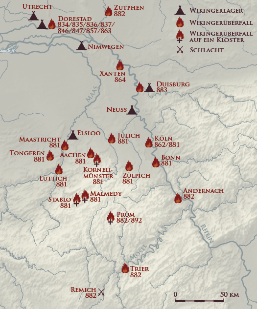 Karte der Wikinger-Raubzüge im Rheinland